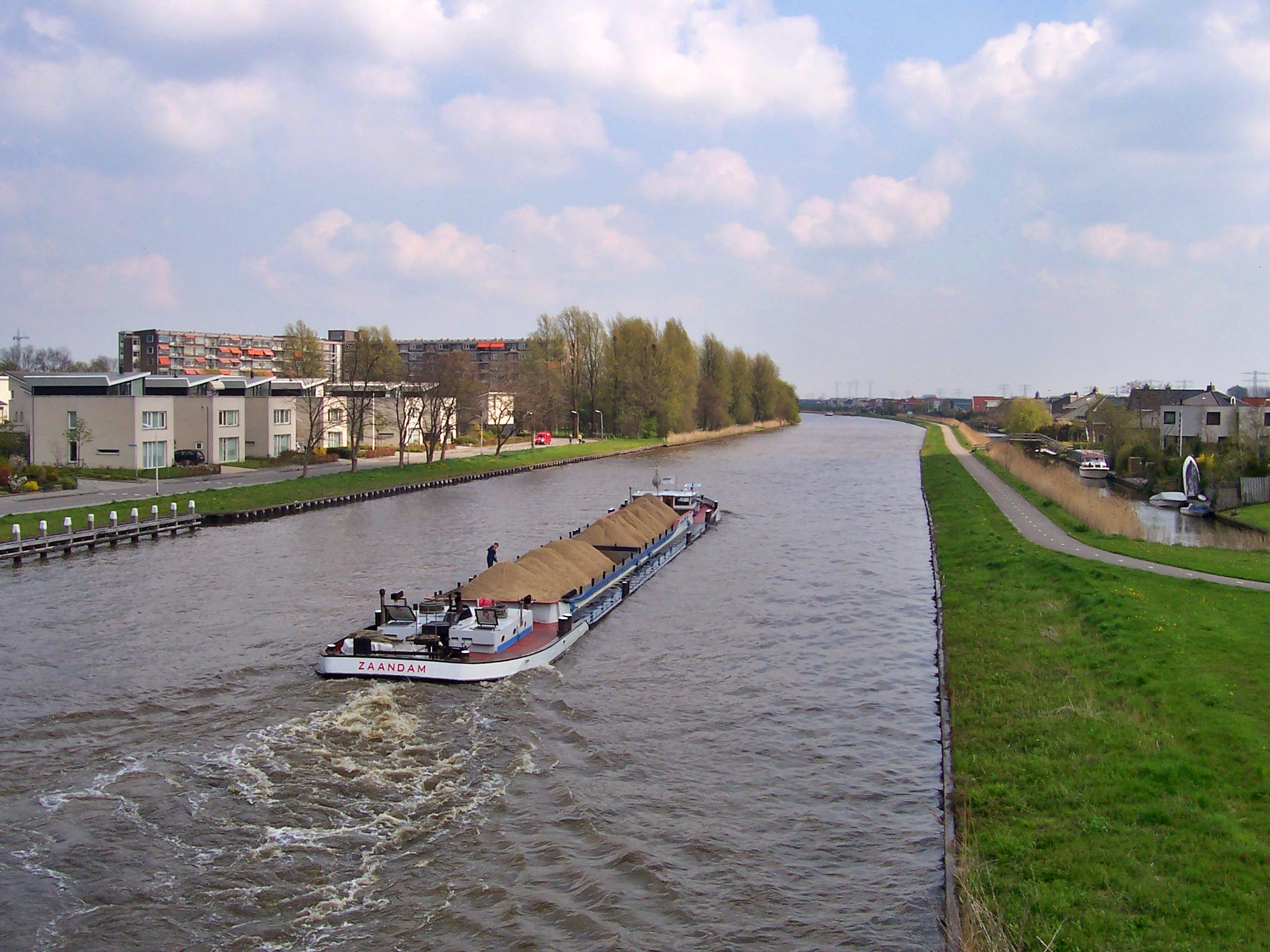 Het motorschip "Bijlmermeer" uit Zaandam vaart over het Van Harinxmakanaal ten zuiden van Leeuwarden. Het schip vervoert zand en is zojuist onder de Van Harinxmabrug door gevaren. De foto is genomen vanaf de Van Harinxmabrug waarover het autoverkeer uit de richting Zwolle de stad Leeuwarden binnenkomt. Links is de stad Leeuwarden, rechts is het dorp Goutum. "Bijlmermeer" is in 1972 gebouwd op de werf "De Amstel" in Ouderkerk aan den IJssel voor het Nieuw Centraal Verkoop Kantoor Zand & Grind Amsterdam BV te Amsterdam. De huidige eigenaar is Ballast Nedam te Zaandam. Het schip heeft een tonnage van 610 ton. De lengte is 55,86 meter en de breedte is 7,36 meter. De diepgang van het schip is 2,05 meter. Het wordt voortgestuwd door een DAF-motor van 224 pk.